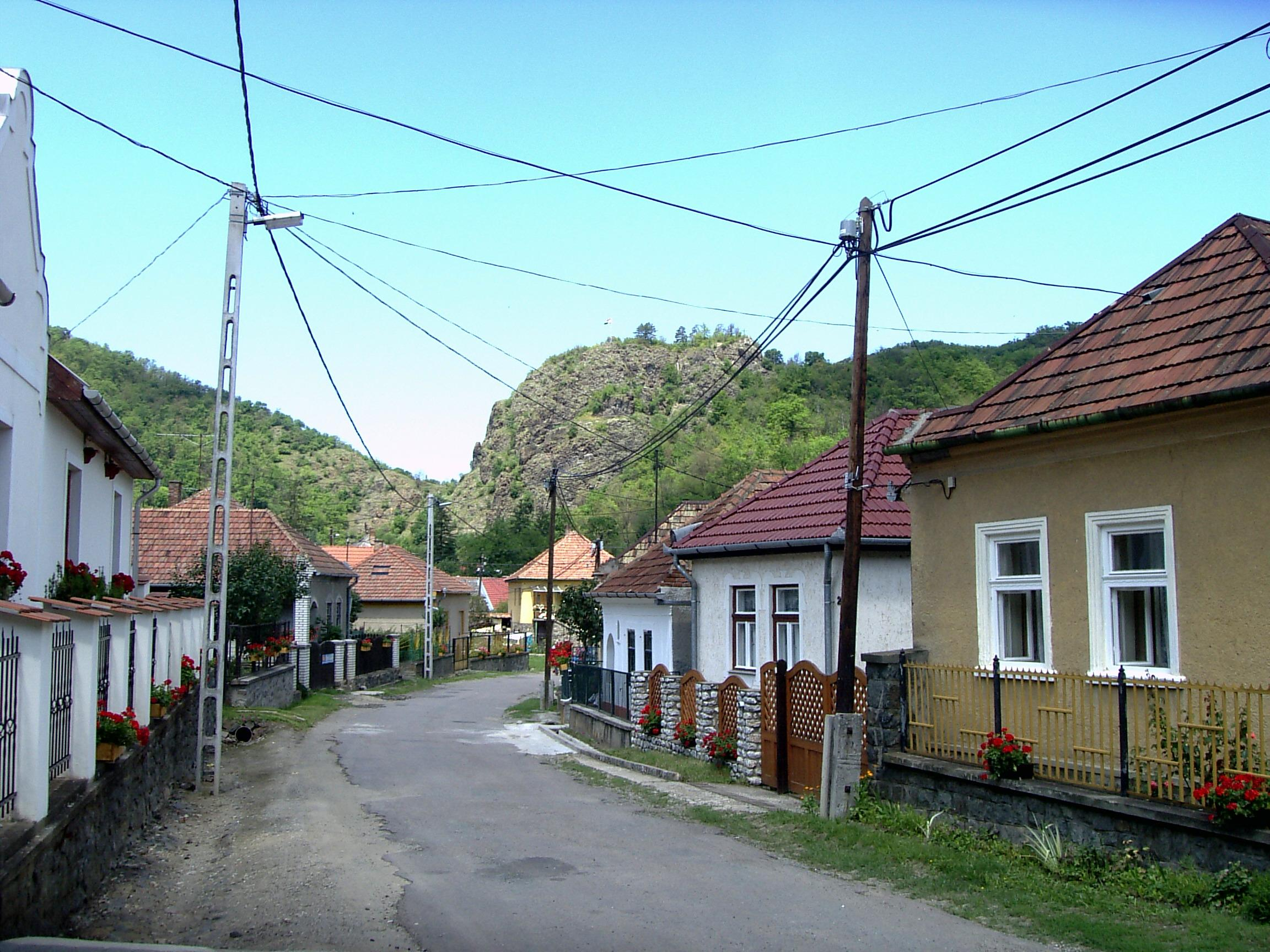 A szarvaskői Várhegy déli oldalának látképe, a község Fő utcájáról.